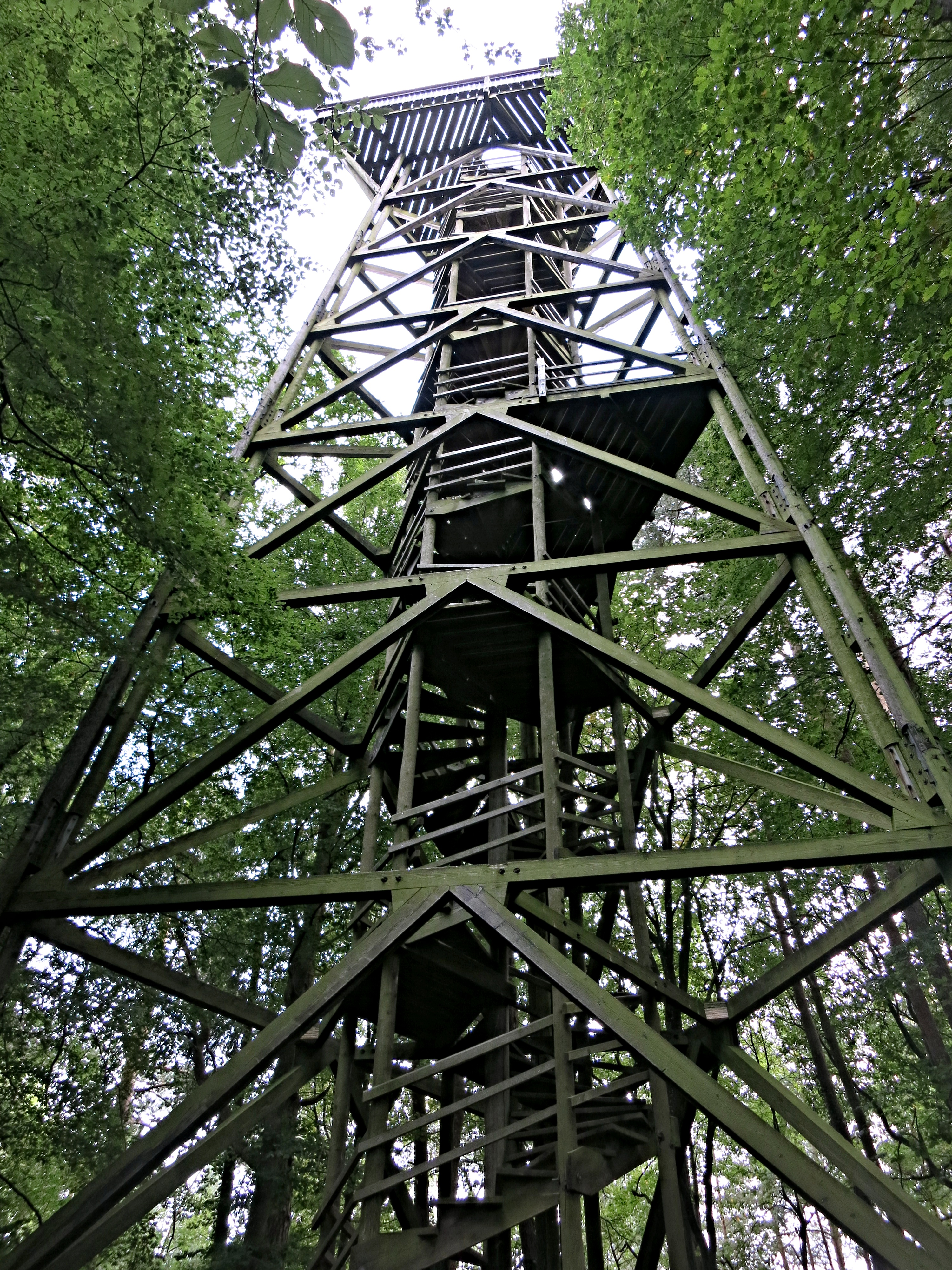 Aussichtsturm Petersboden